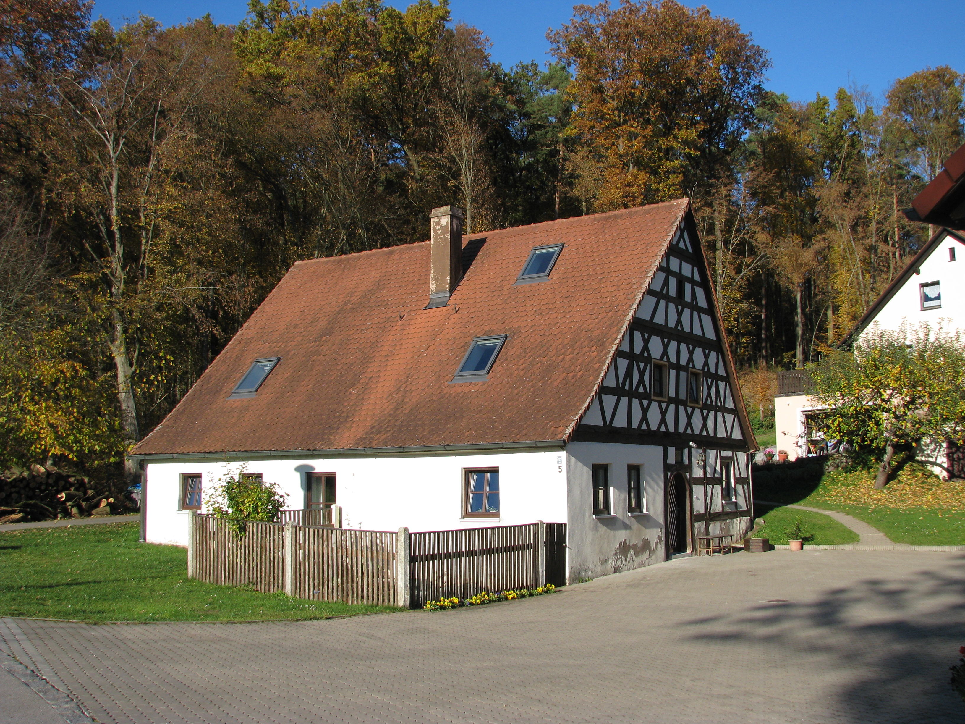 Eibach, Ortsteil von Hilpoltstein im mittelfränkischen Landkreis Roth, ehemaliges Wohnstallhaus